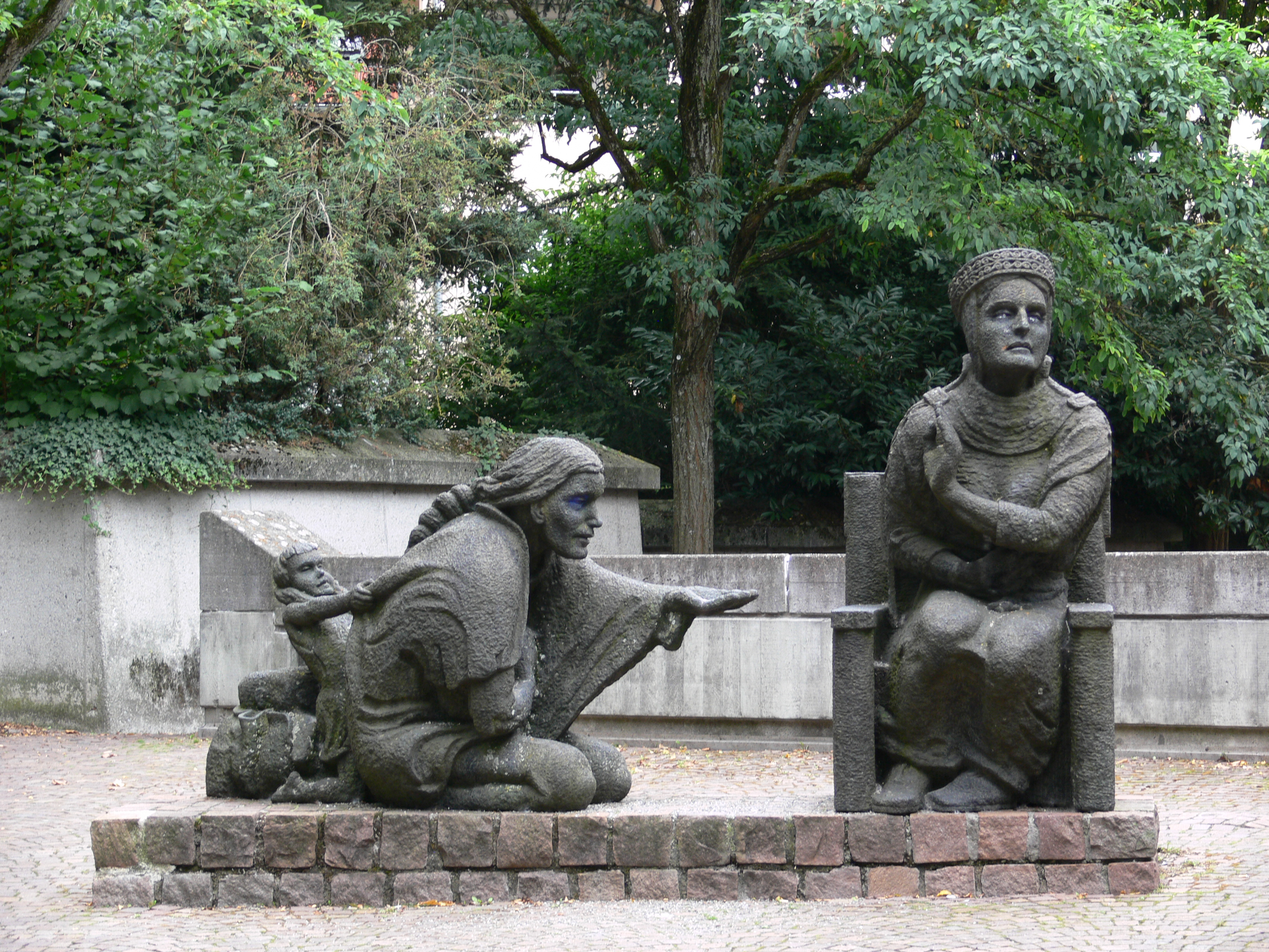 Weingarten (Württemberg), Kleiner Münsterplatz, Skulpturengruppe "Welfensage" (Gräfin und Bettlerin) von Eberhard Martin Schmidt, Vulkanstein, 1991